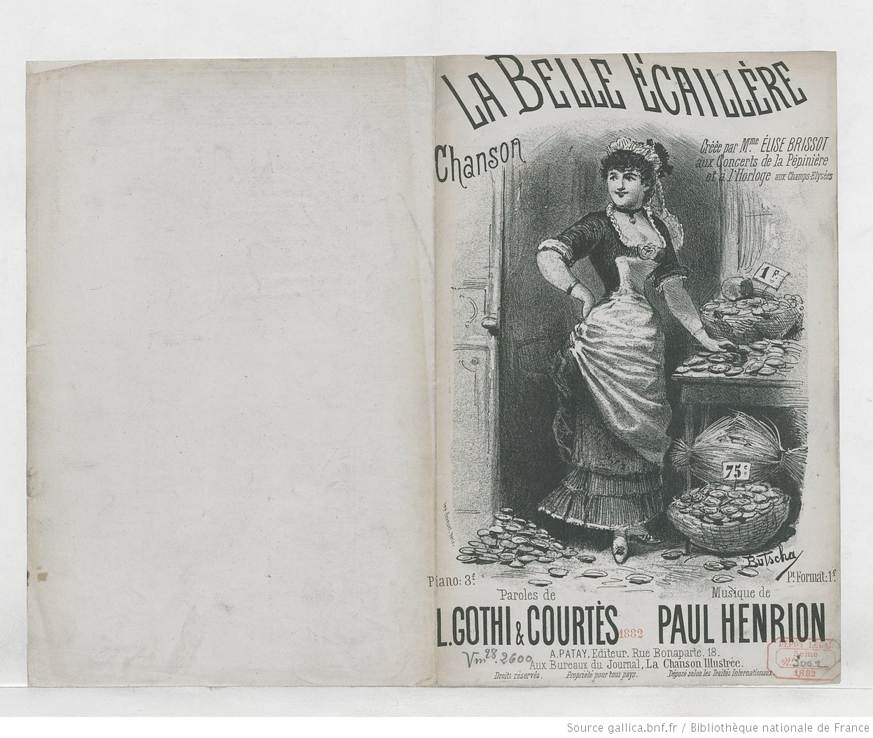 La belle écaillère, paroles de Gothi et Courtès, musique de Paul Henrion